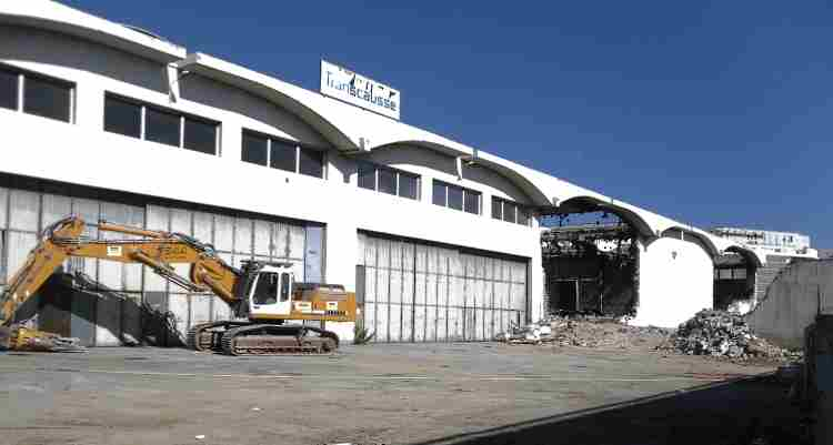 Démolition du hangar Transcausse avant les travaux du programme Quai d'Arenc du promoteur immobilier Constructa en aout 2010.